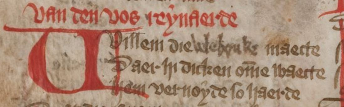 Fragment (eerste regels) van Van den Vos Reynaerde in het Comburger Handschrift.